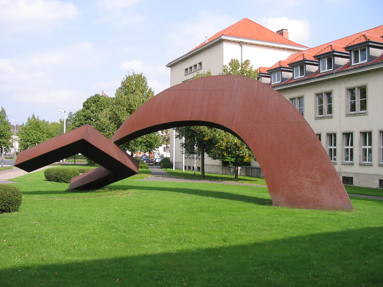 Braunschweig, Skulptur am Arbeitsamt von Franz Bernhard (*1935) aus COR-TEN-Stahl